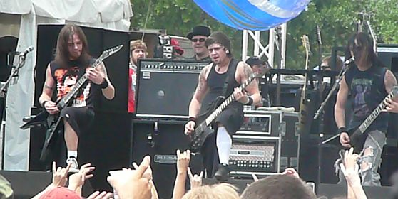 Earthday Birthday 14 - 4.28.07